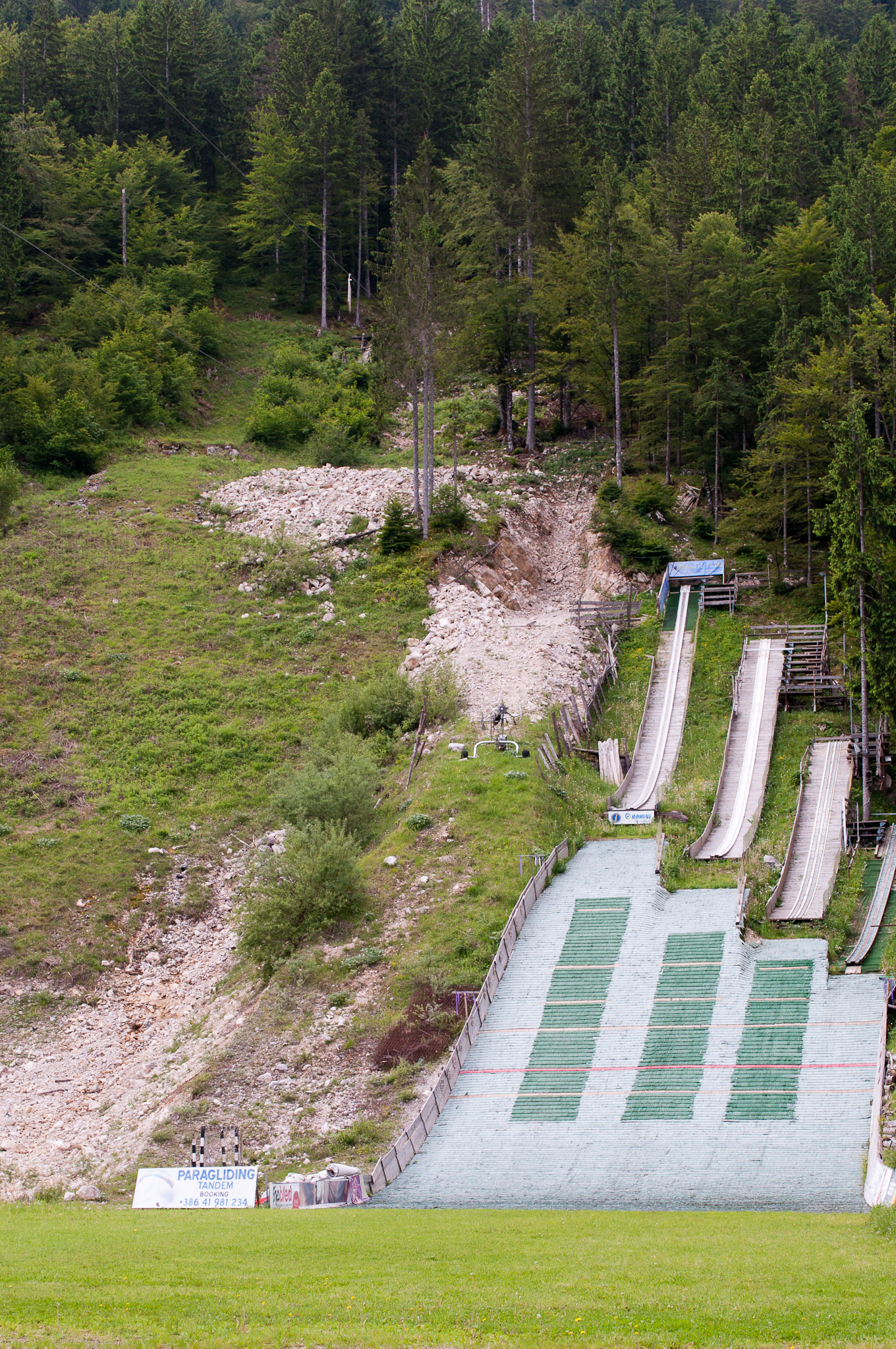 Porušena stara skakalnica in štiri manjše skakalnice.